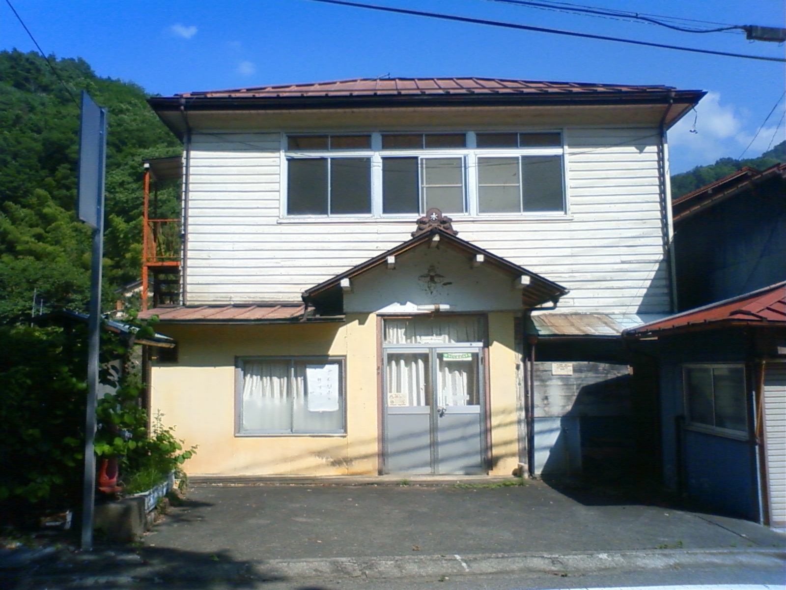 旧古関村役場